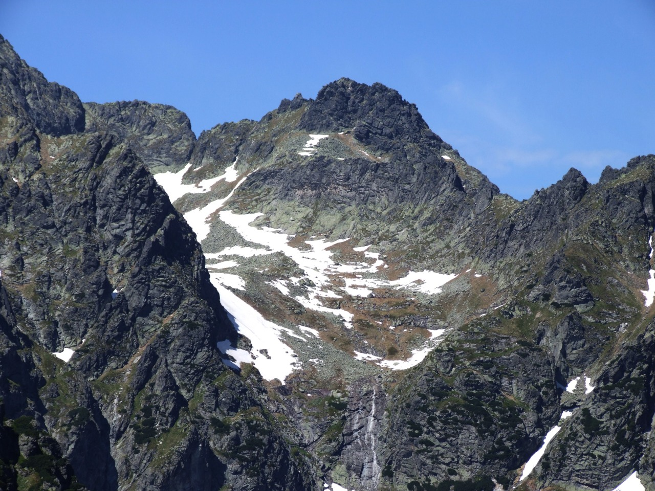 Dolina Spadowa. Nad nią (od prawej):Młynarzowa Przełęcz, Wyżni Żabi Szczyt, Ciężka Przełączka i Spadowa Kopa